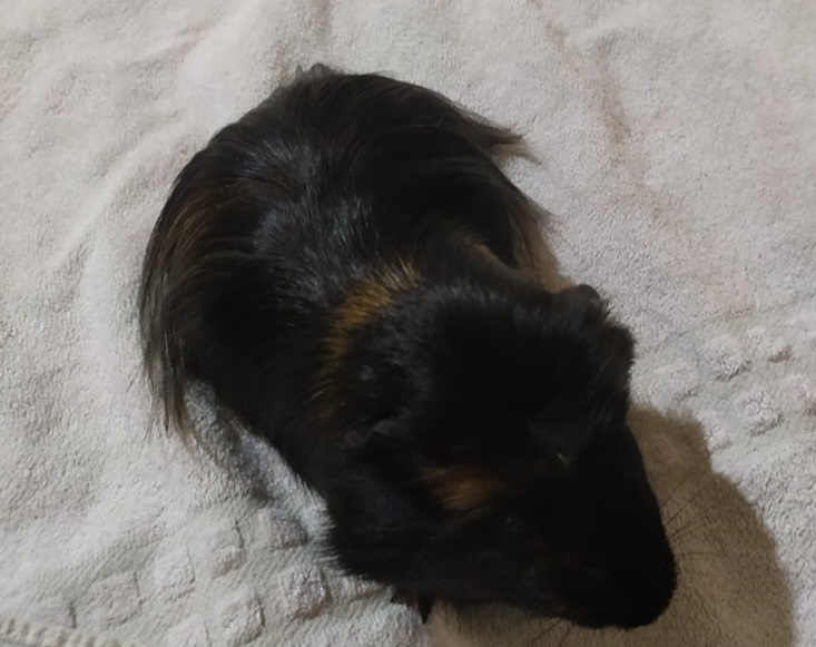 Porquinho-da-índia coroado